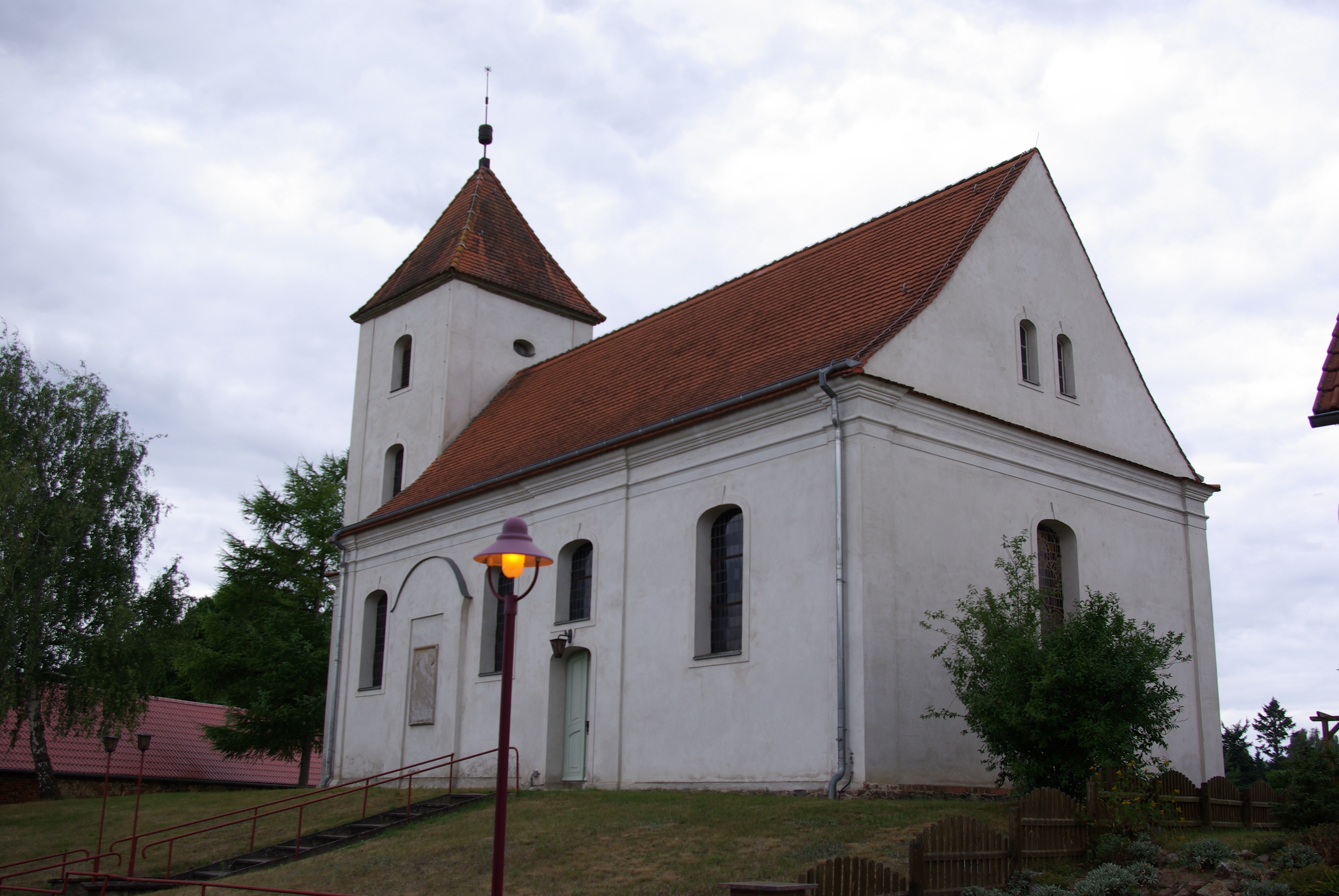 Müncheberg, Ortsteil Hoppegarten. Die Kirche steht unter Denkmalschutz und wurd e1714 im barocken Stil erbaut.